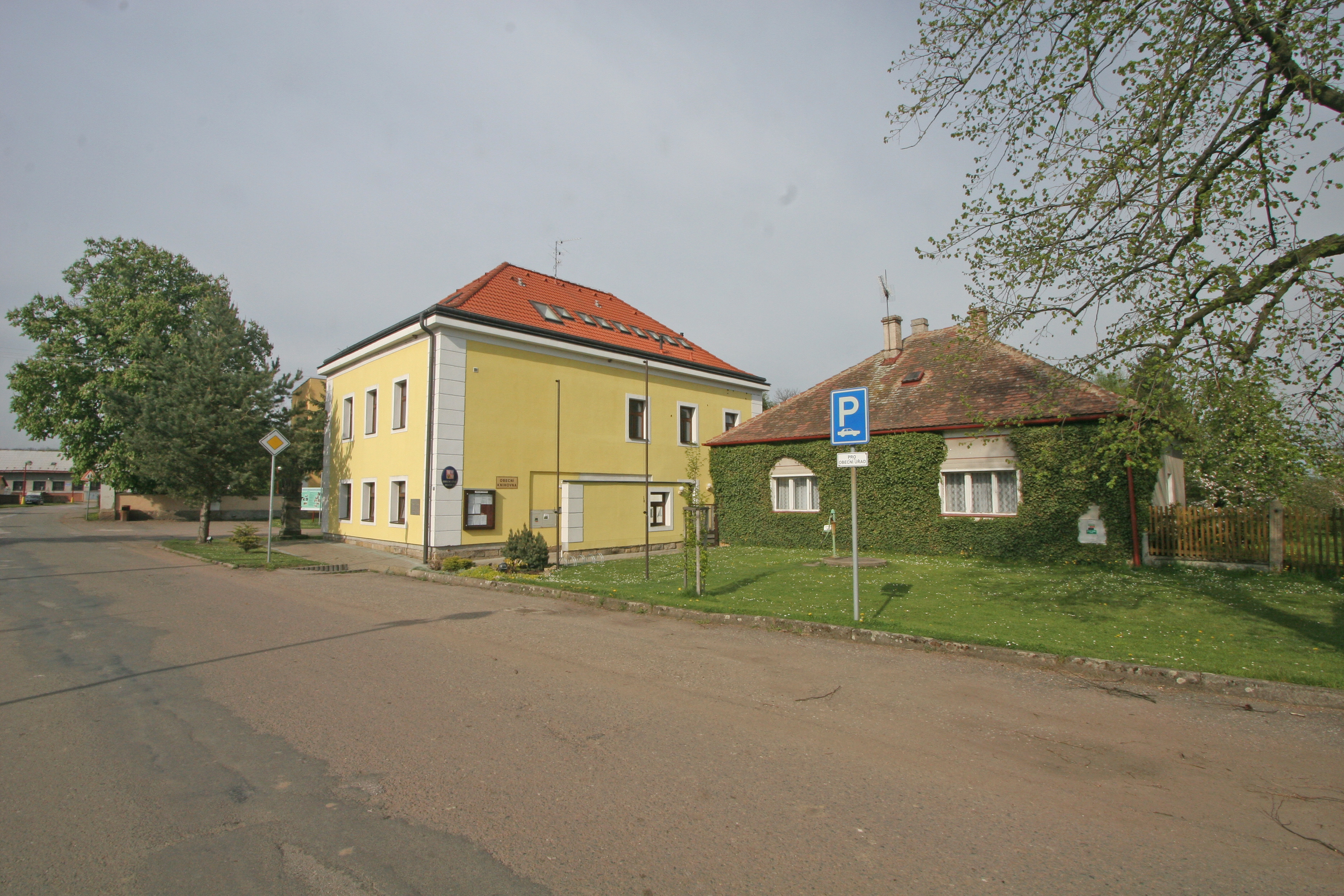 Hlušice čp. 101 a obecní úřad